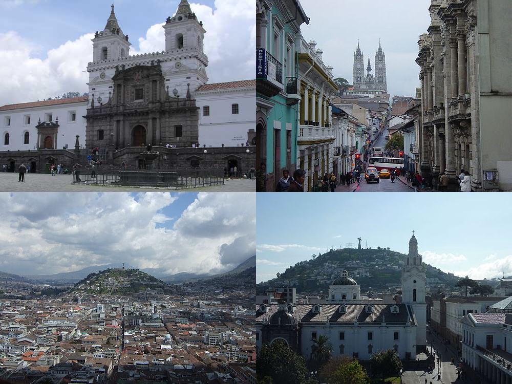 Centro Histórico de Quito, Ecuador (Primer Patrimonio de la Humanidad)